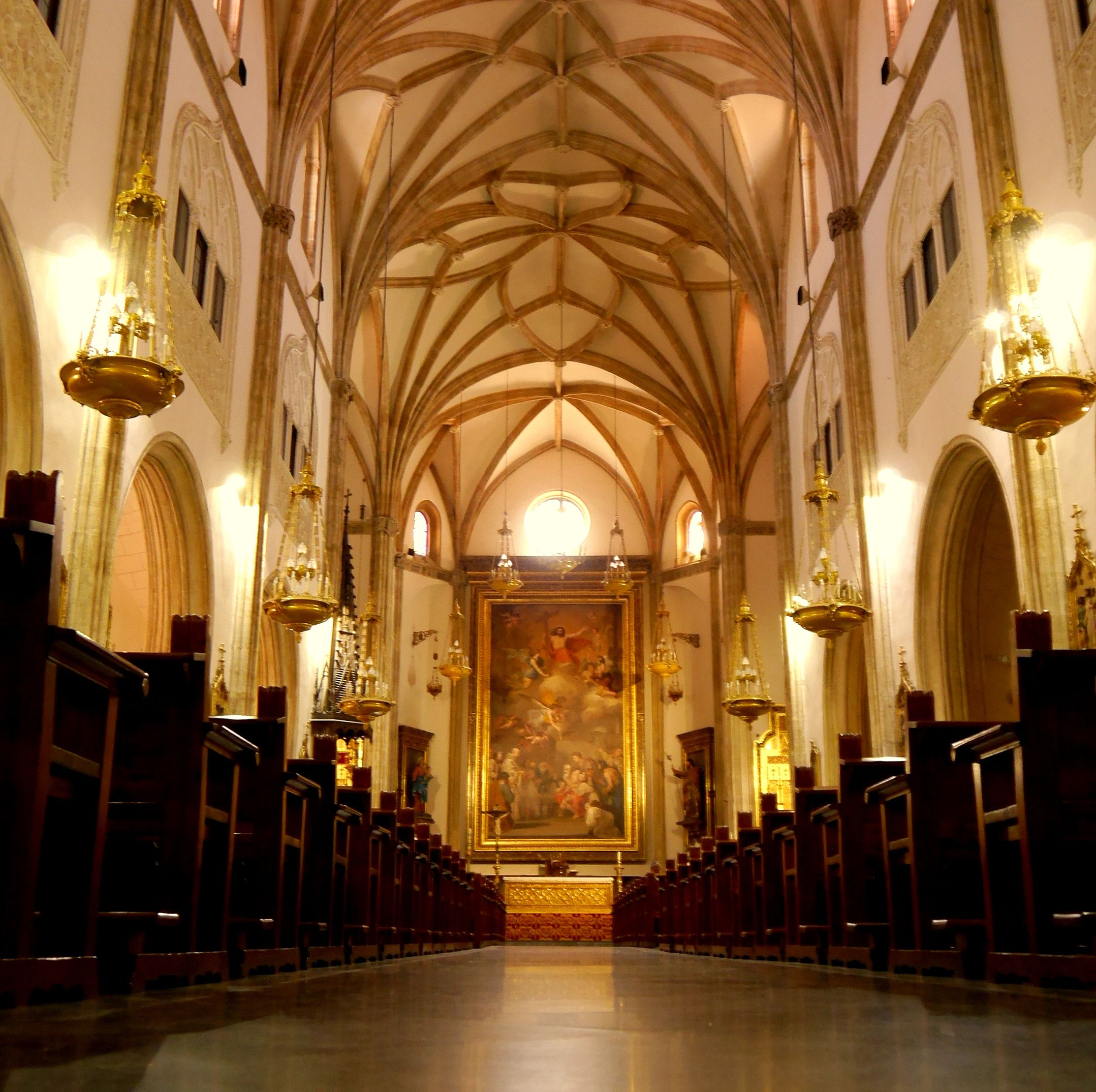 Kirche San Jeronimo el Real in Madrid This work by Ronny Siegel is licensed under a Creative Commons Attribution 4.0 International License. - You can freely use this work, any way you want including altering and/or selling if you call my name on your publication. You can find this picture also on my website